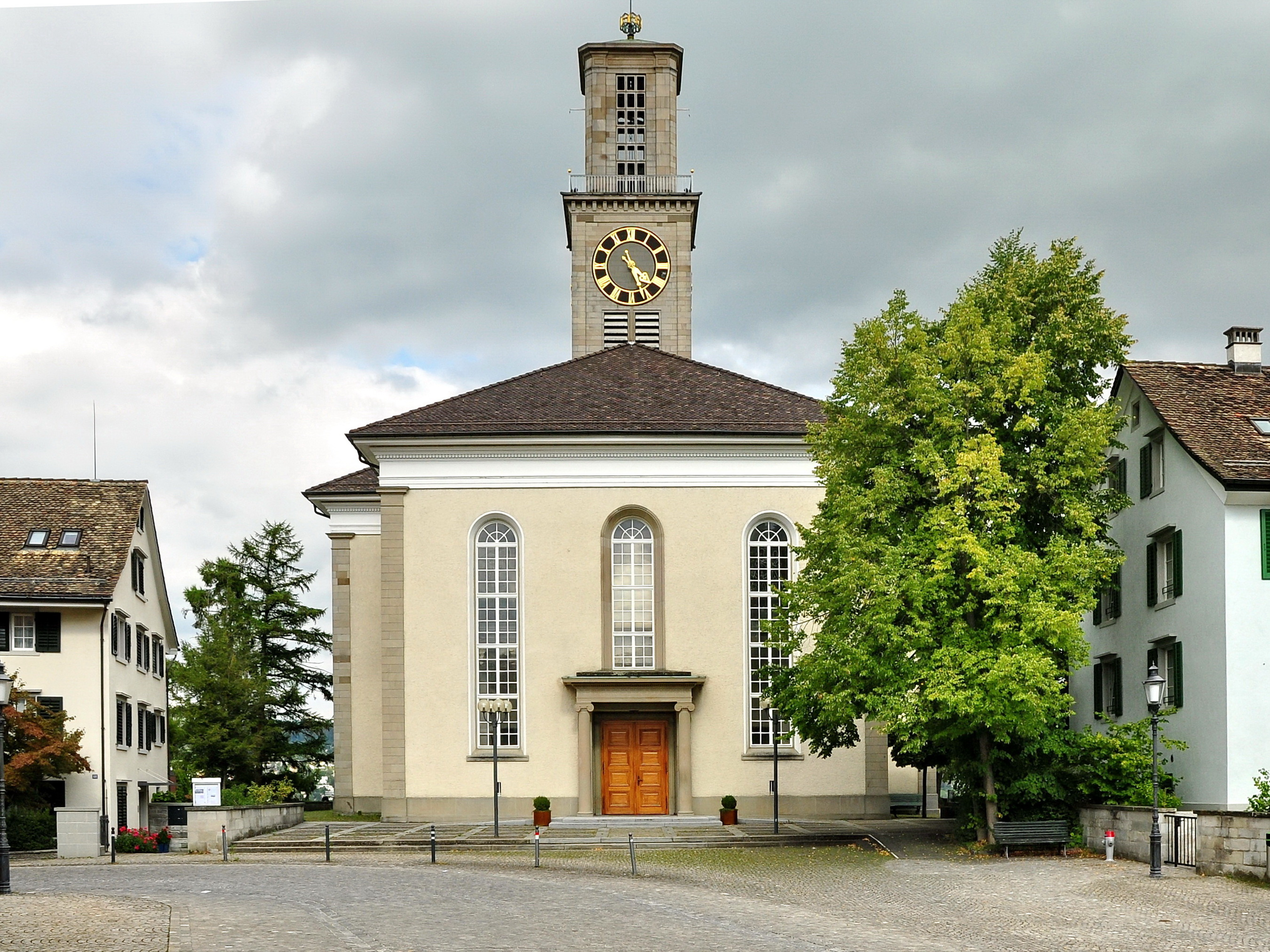 Reformierte Kirche in Thalwil (Switzerland)